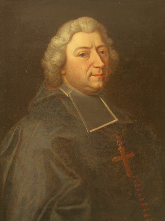 Portrait de Monsieur de Caumartin, évêque de Blois